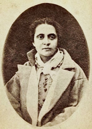 Marija Pavlovna Kovalevskaja